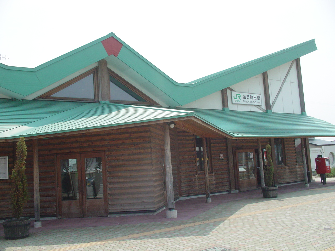 （陸奥鶴田駅）